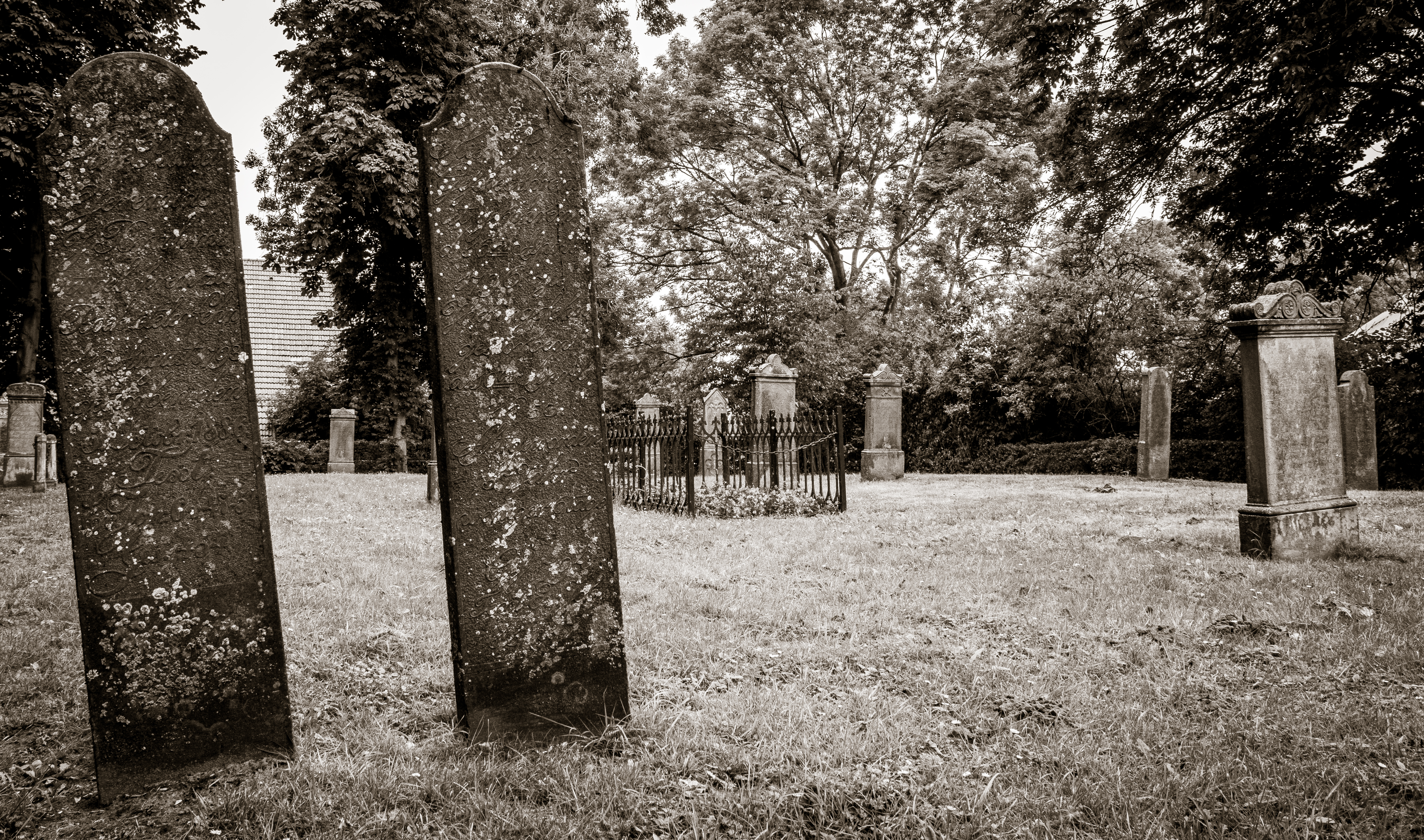 Boekzetelerfehn – Friedhof (Klosterfriedhof) mit: Wurt; mit einer Grabplatte des 17. Jahrhunderts und etlichen des 19. Jahrhunderts